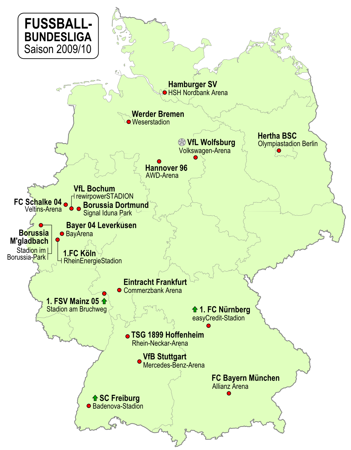 Karte der Vereine der Fußball-Bundesliga-Saison 2009/2010